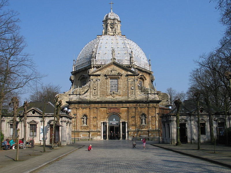 Basiliek van Scherpenheuvel